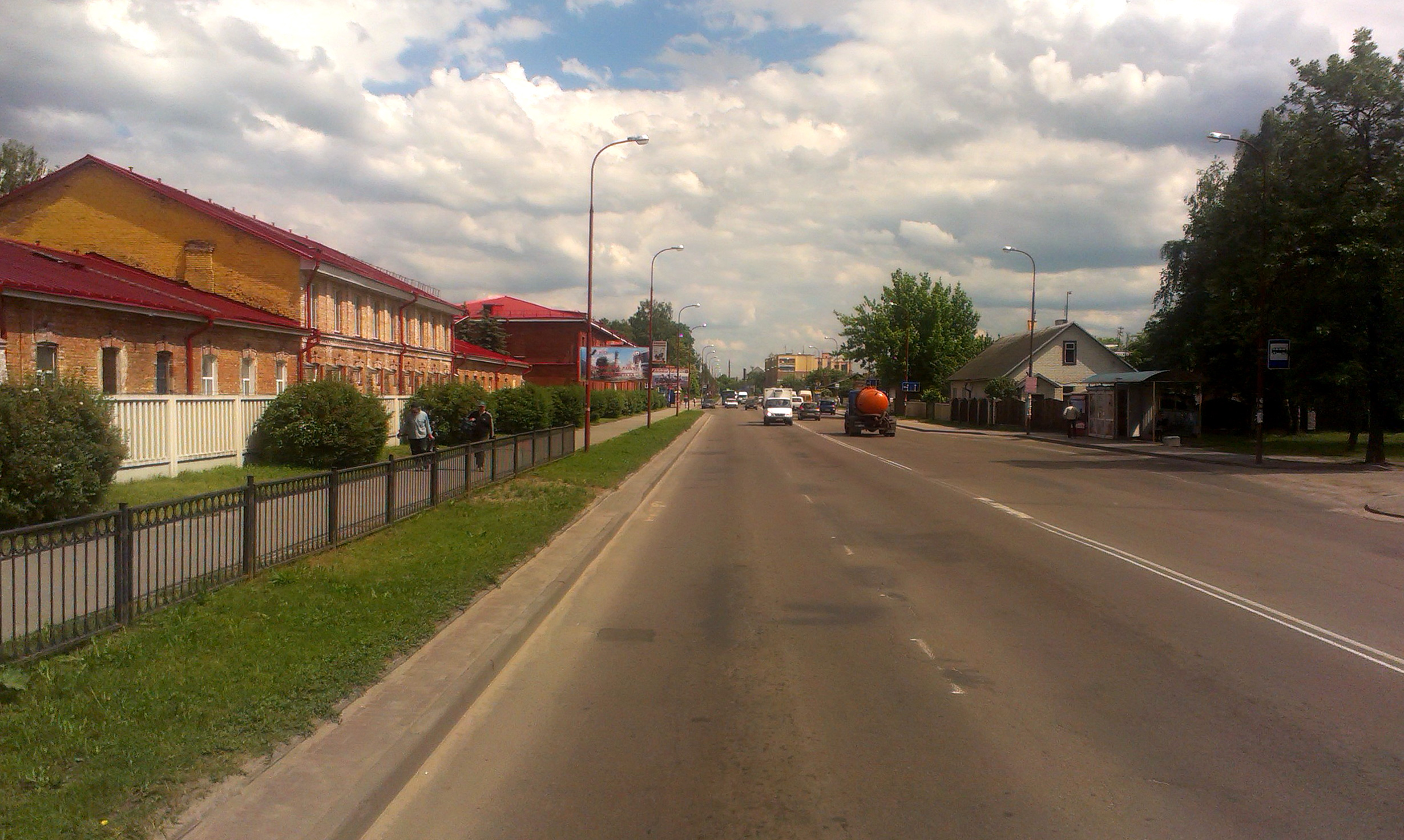 Вул. Брэсцкіх дывізій